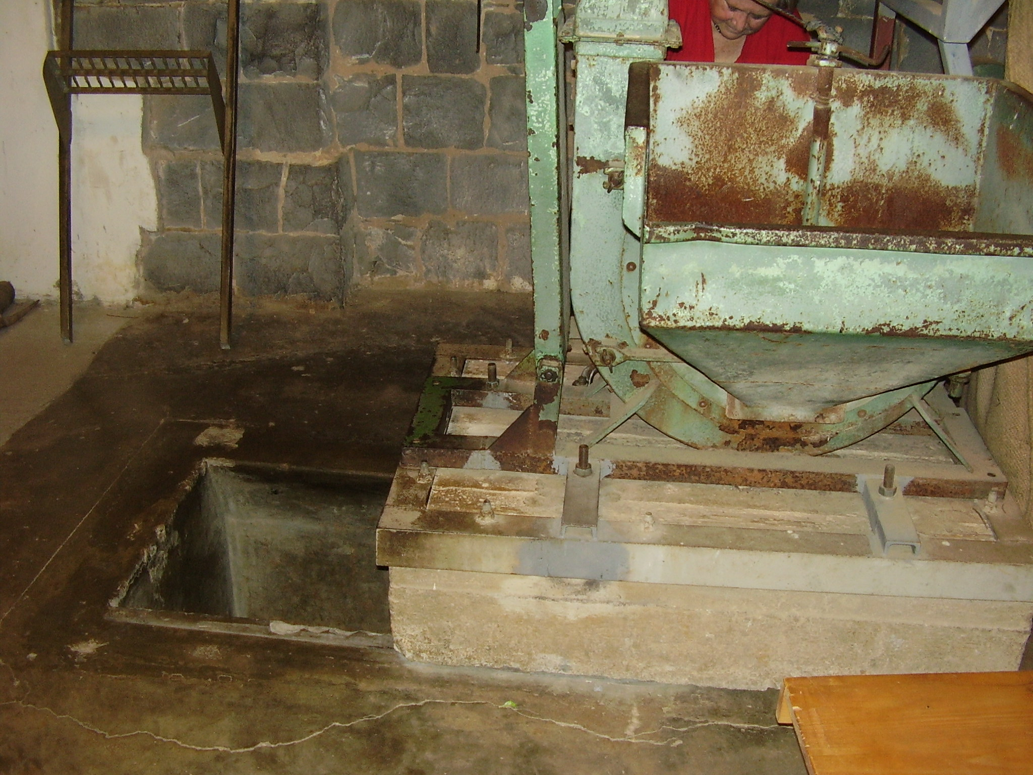 פתח הכניסה לסליק ההגנה בכפר גלעדי רישיון נוצר על ידי משתמש:Avi1111